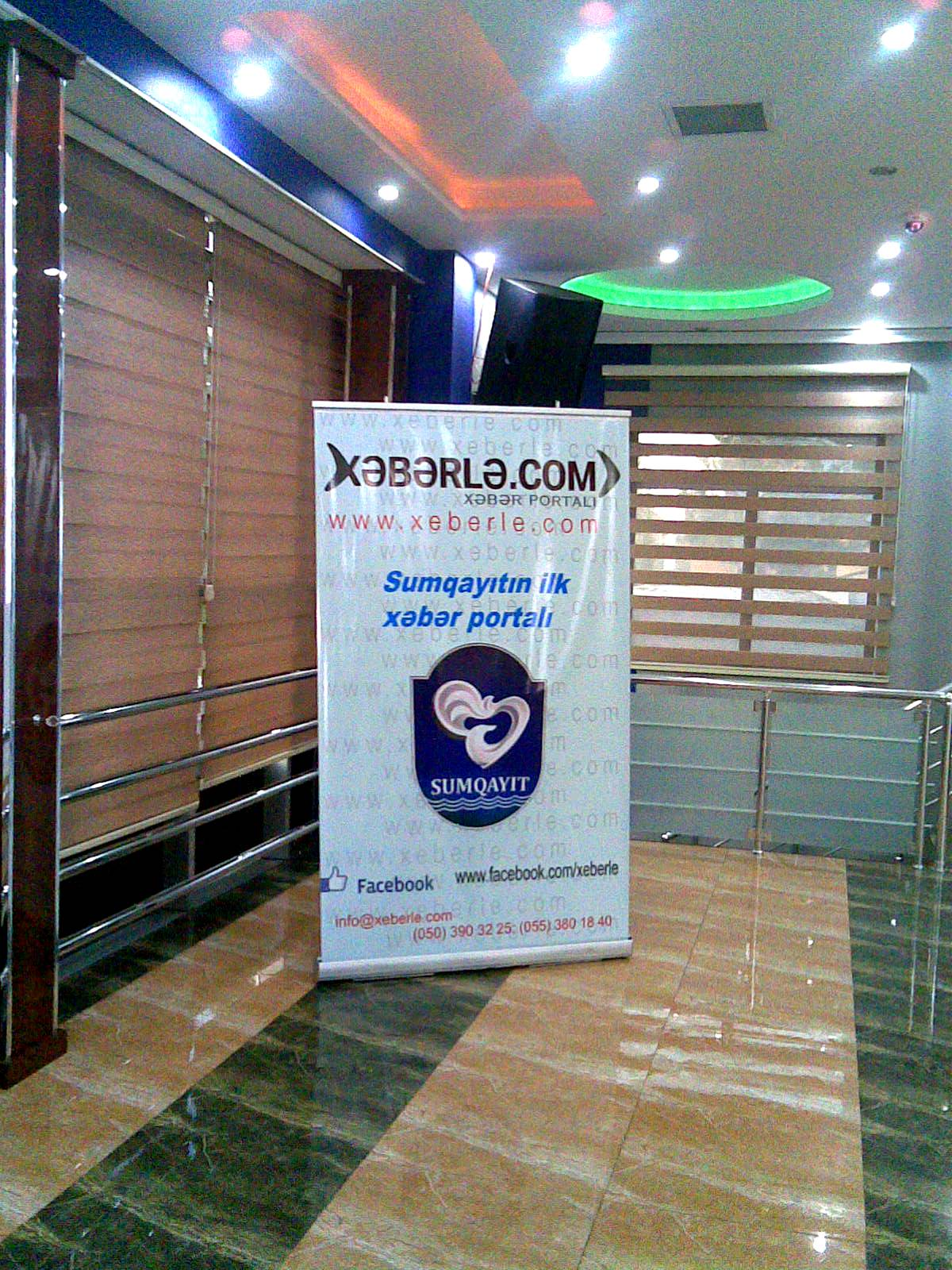 Xəbərlə - 1 yaş